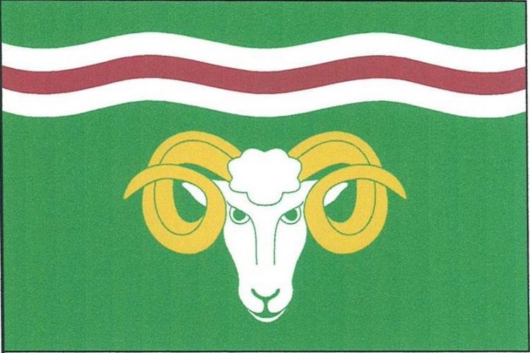 vlajka, Bečice, okres Tábor